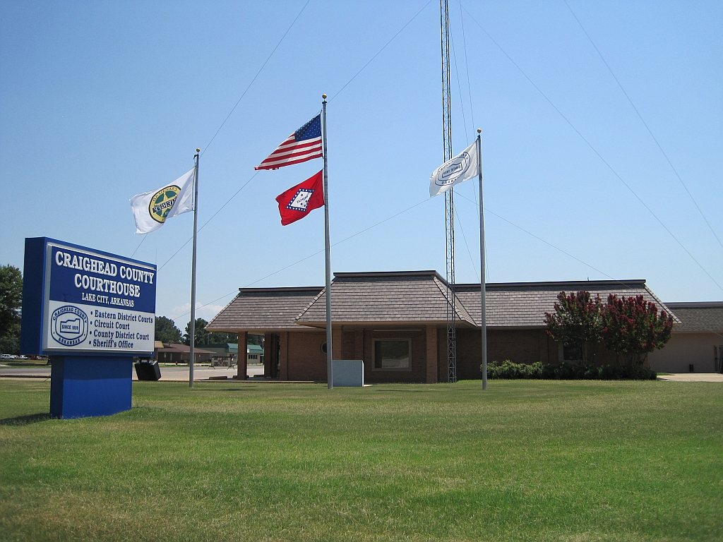 Lake City, Arkansas